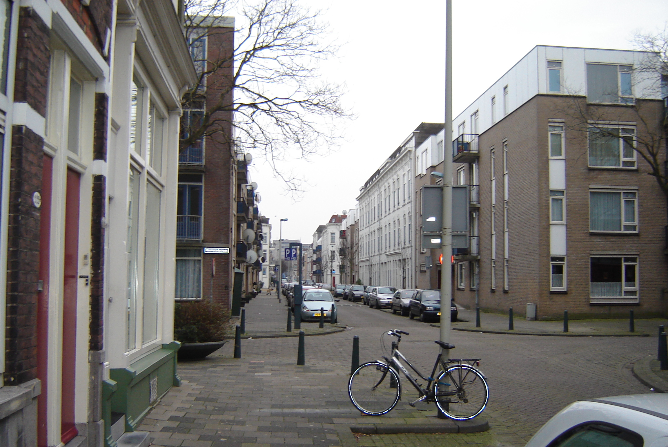 Description Agniesestraat verleend Agniesestraat